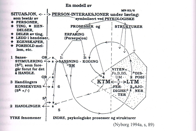 Magne Nyborg: PSI-modellen